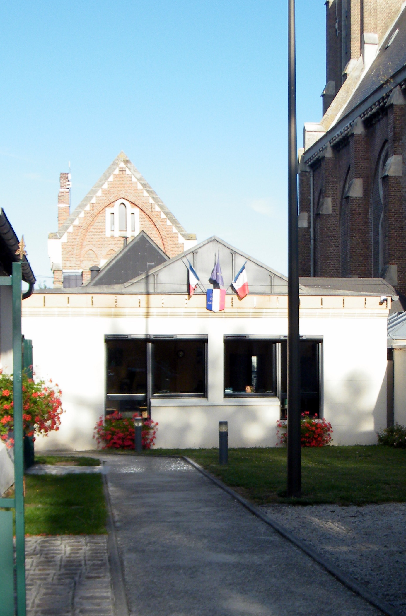 Dreui-lès-Amiens, mairie.